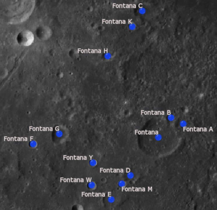 Cráter lunar Fontana. Cráteres satélite. (Imagen LROC)